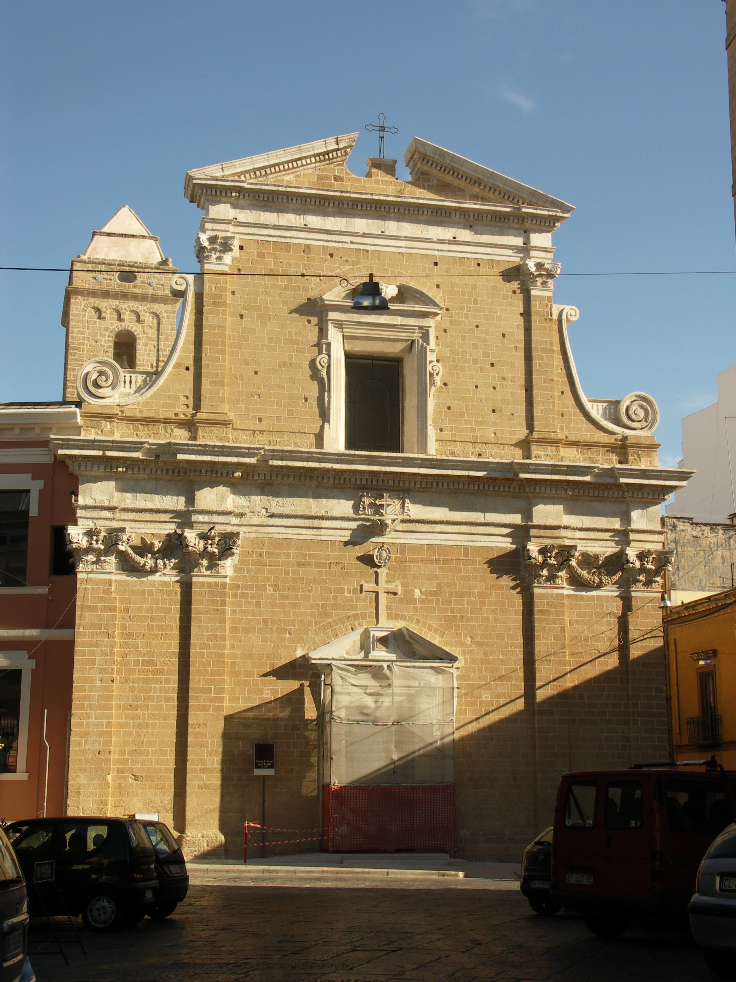 Angeli